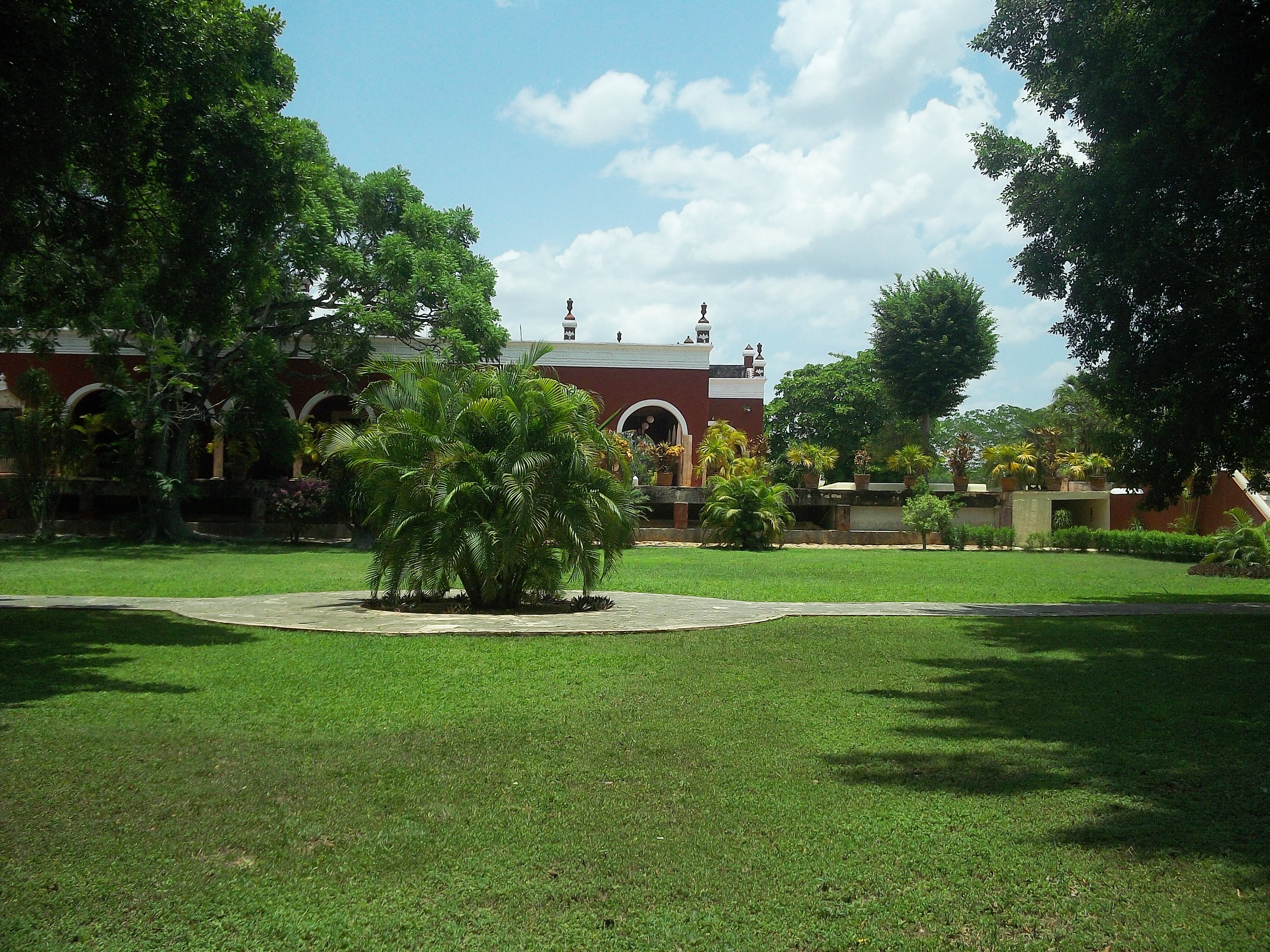 Hacienda de San Pedro Chimay, Yucatán.